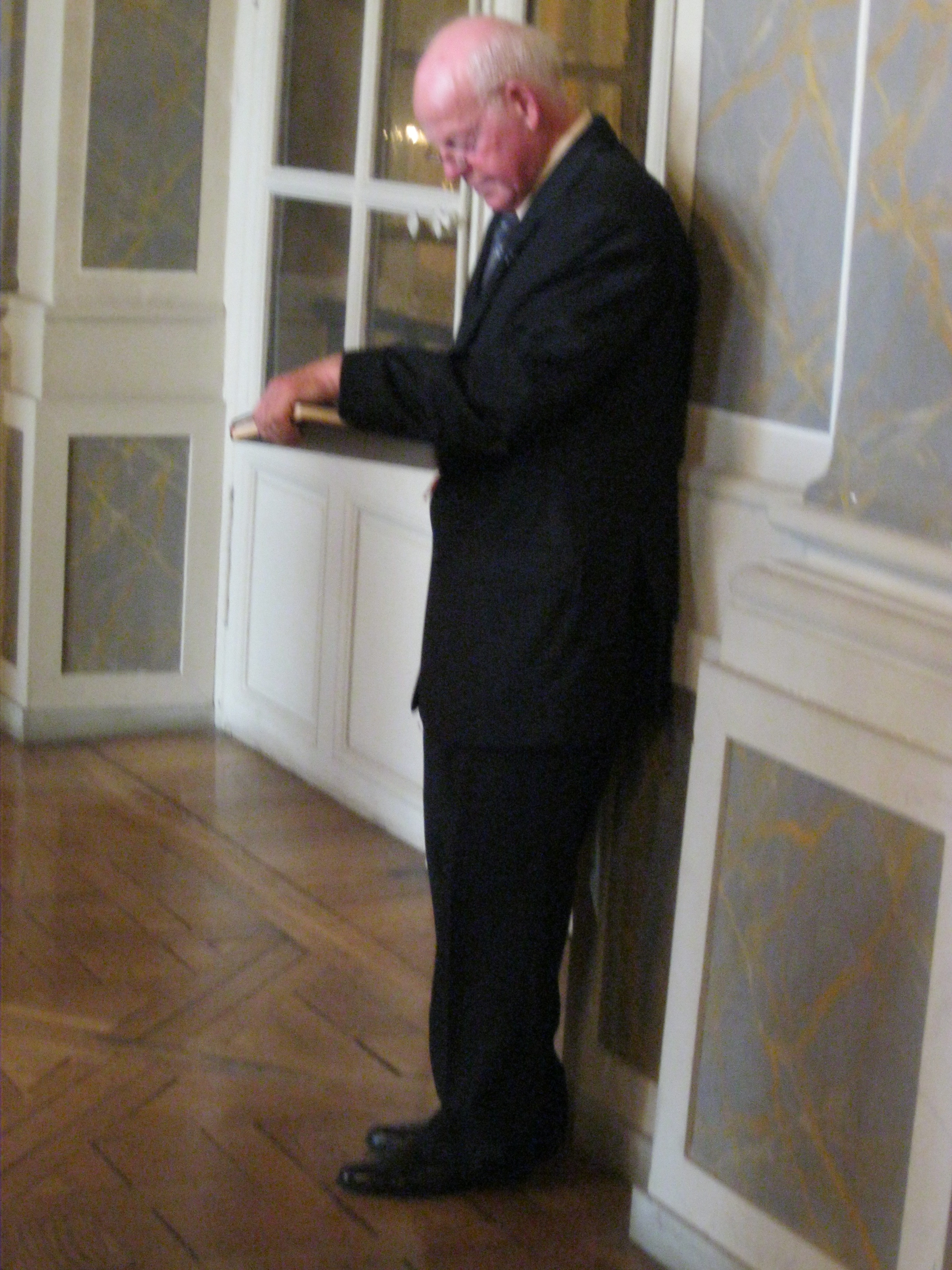 Gabriel Spahn consultant le livre d'or de la FICEP